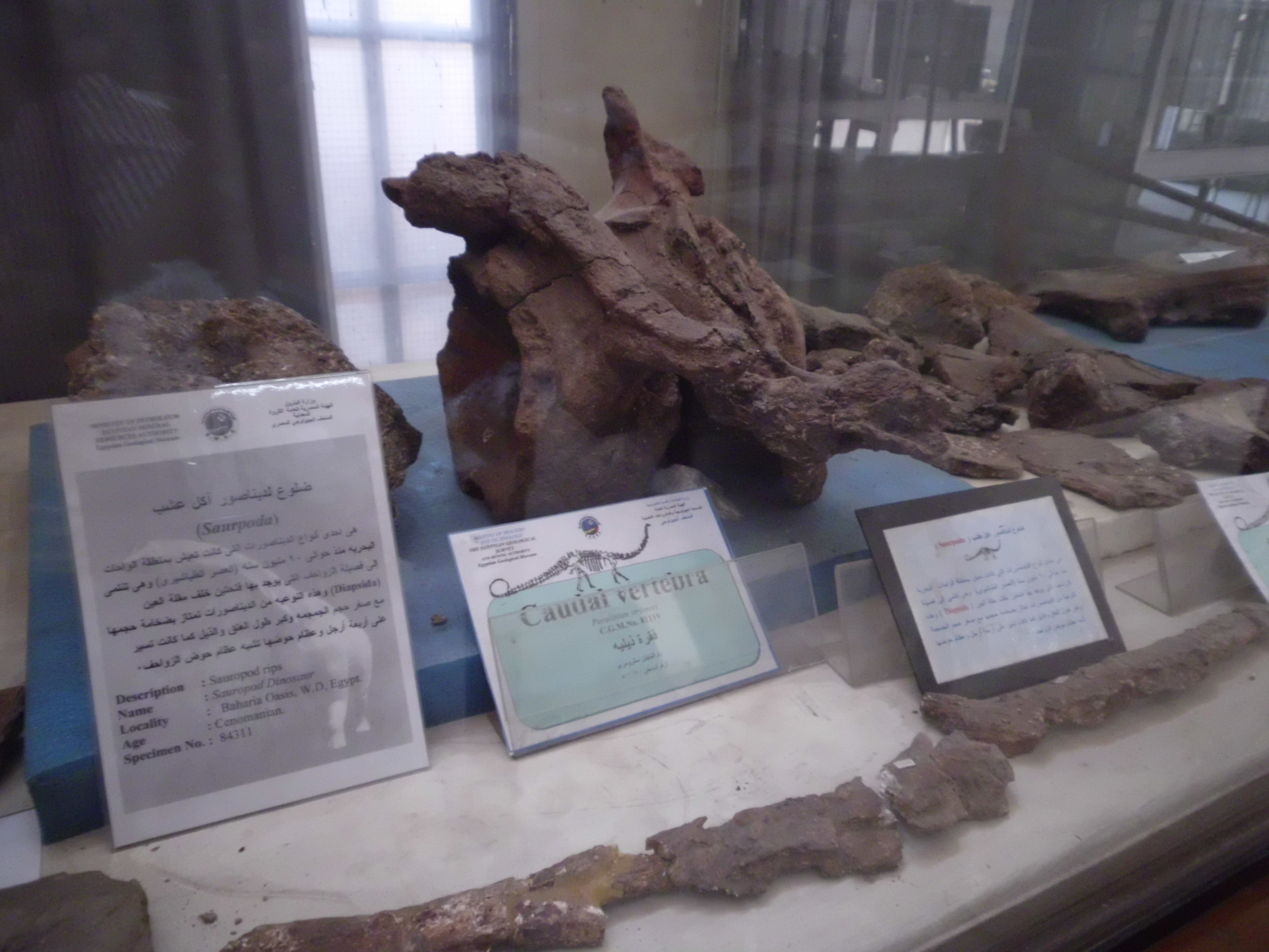 هو احد انواع الديناصورات اكلة الاعشاب في العصر الطباشيري المتاخر بمنطقة الواحات البحرية منذ ما يقرب من 95 مليون سنة وتم اكتشافه بواسطة المساحة الجيولوجية المصرية عام 2000 وكلمة الباراليتيتن كلمة لاتينة تعني (ديناصور المد والجزر) وهو ديناصور اكل للاعشاب يمتاز بحجم جمجمة صغير ورقبة طويلة واطراف امامية مساوية في الطول للاطراف الخلفية وذيل طويل وبلغ وزنه 80 طن وطوله 33,5 متر ويعد ثاني اضخم ديناصور في العالم في العصر الطباشيري وكان فريسه سهله لديناصور اسبينوسورس والكركرودونت سورس والبحرية سورس